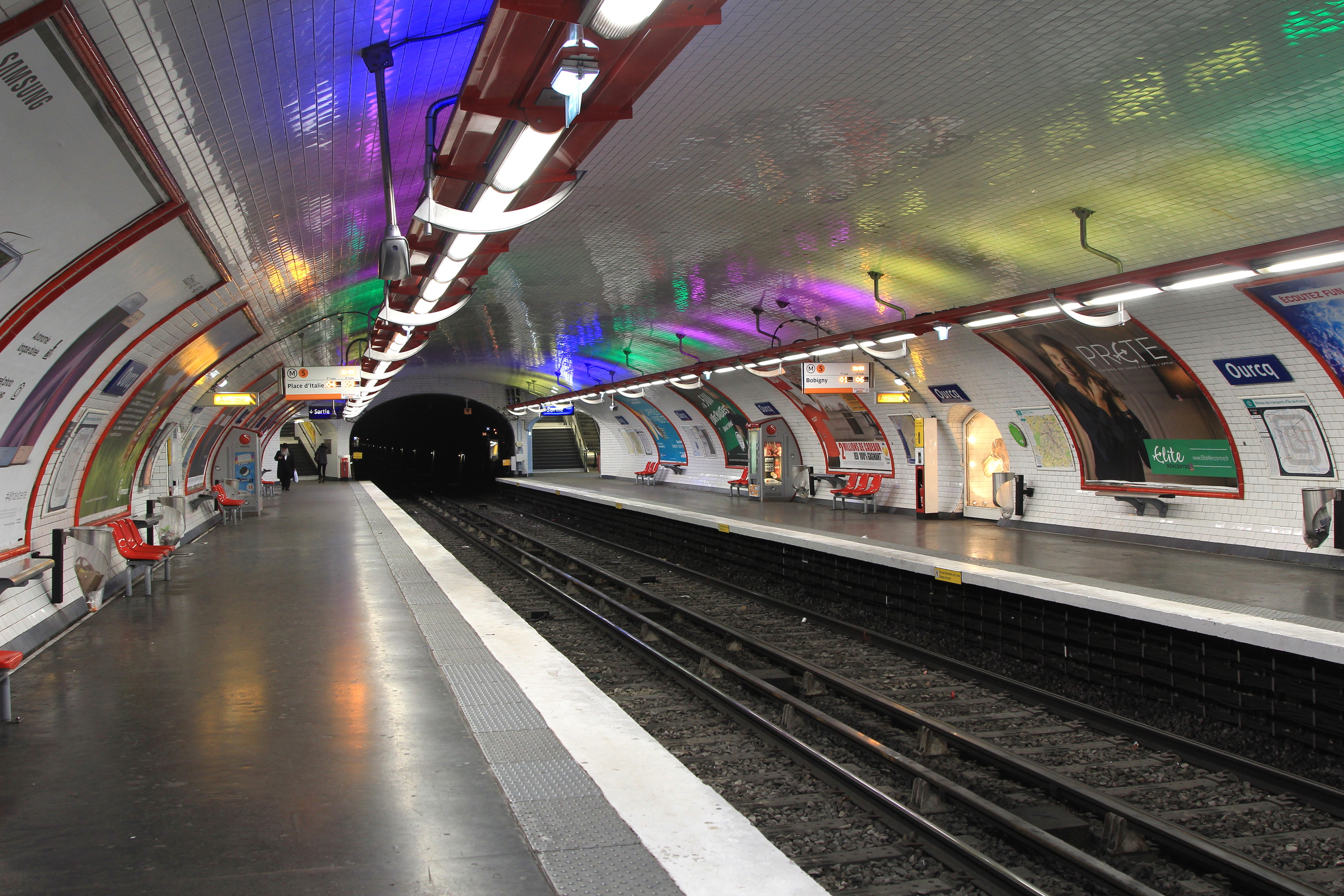 Quai de la station Ourcq de la ligne 5 du métro de Paris en direction de Bobigny.